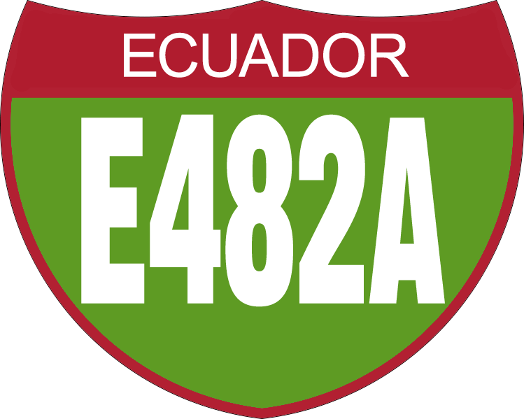 Disco de Identificación Vía Colectora E482A